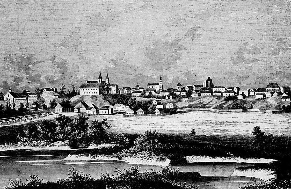 Miasto Owrucz w połowie XIX wieku